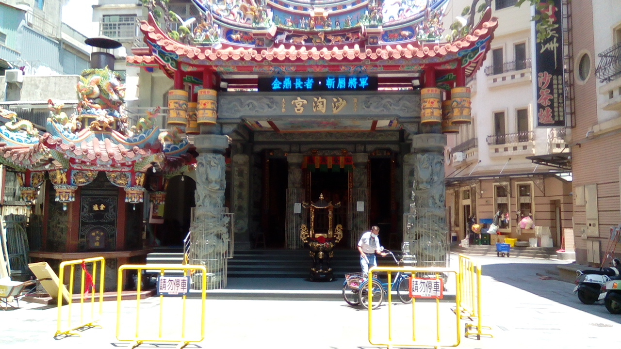 位於台南市中西區西門路二段116巷 政大書城後方